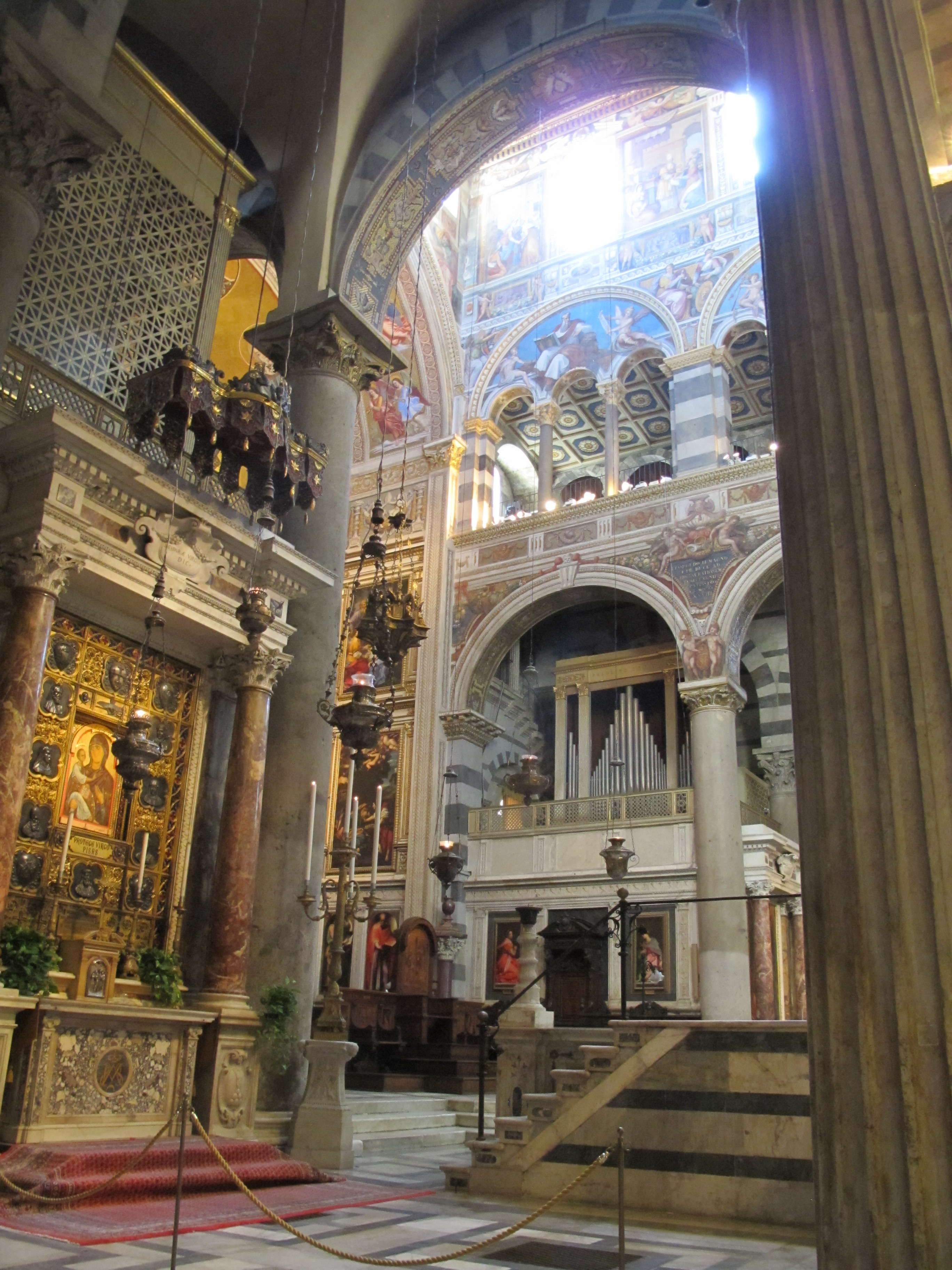 pisa, il duomo